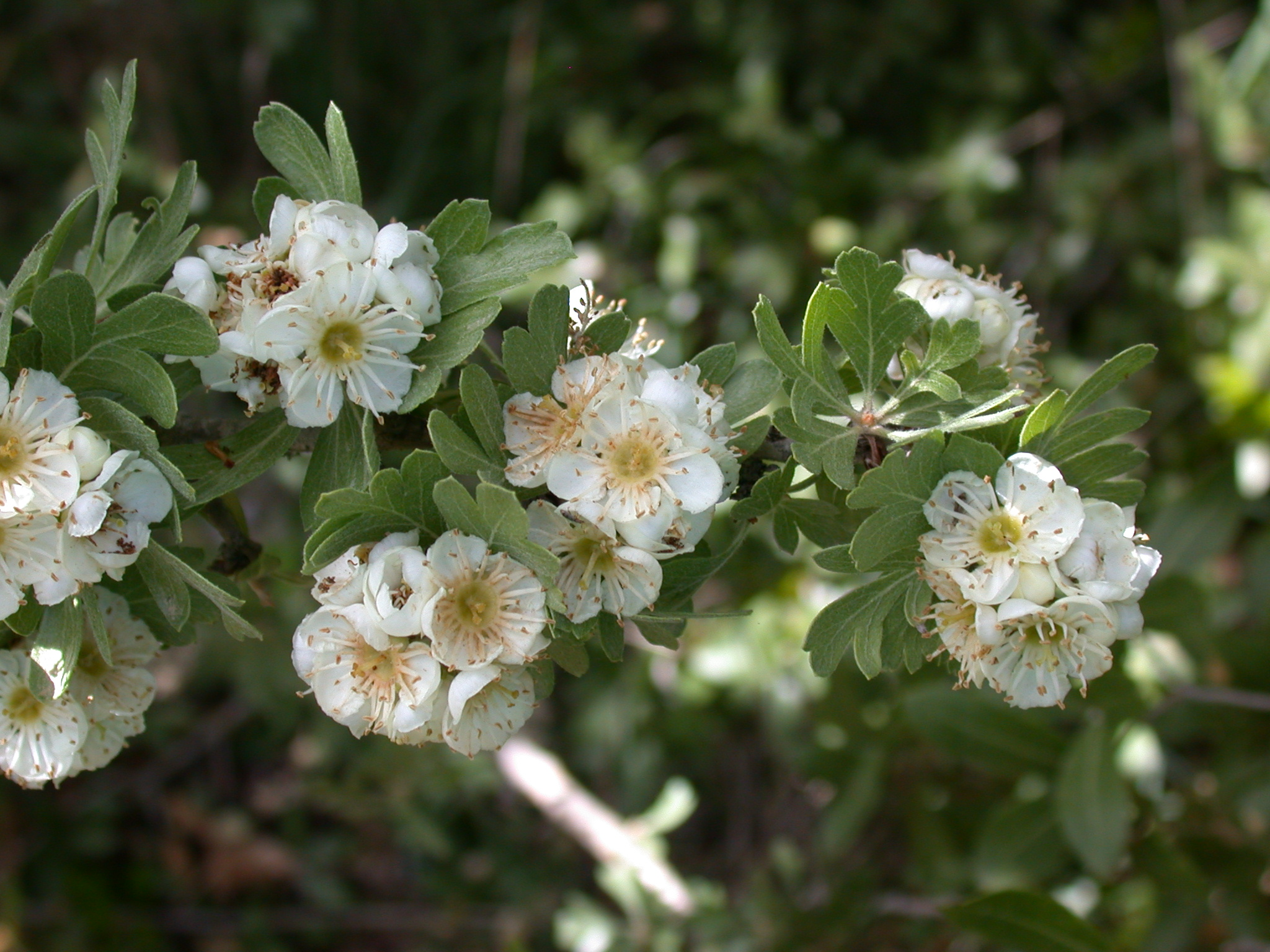 Crataegus azarolus L. (syn. C. aronia (L.) DC.) (עוזרר קוצני), Upper Galilee, Israel, April 16, 2008.